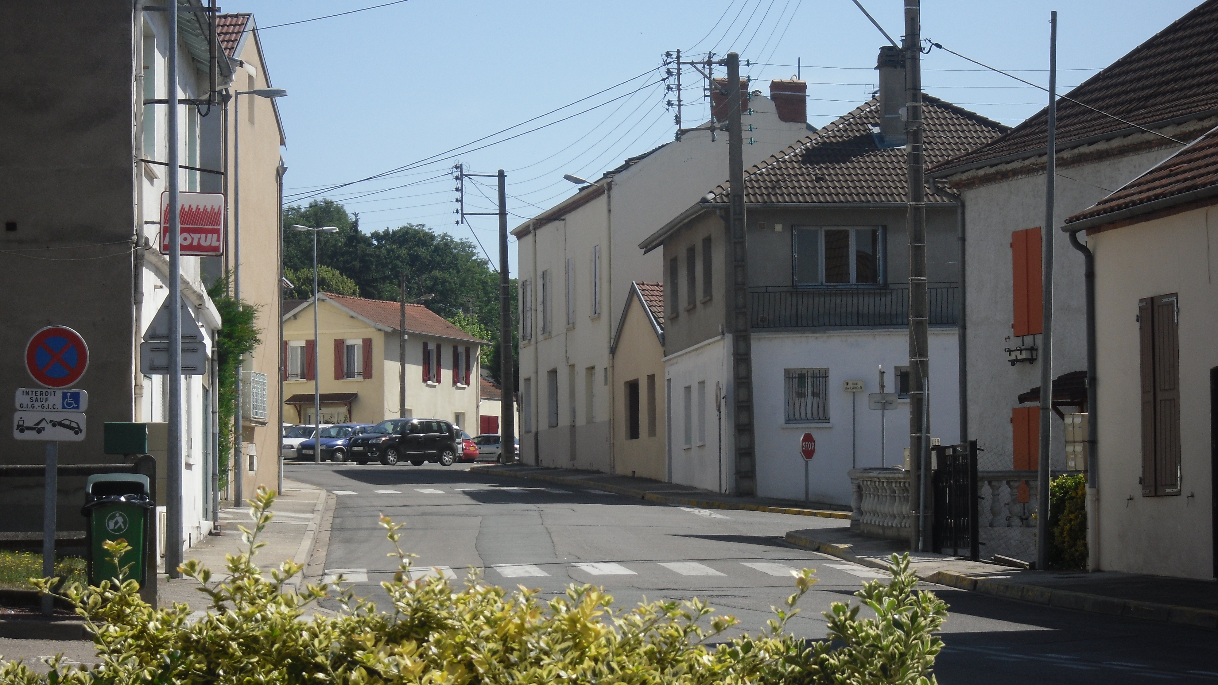 Rue Gambetta de la commune de Saint Yorre dans l'Allier.